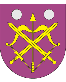 Проект герба Бишева, що не був затверджений сільською радою